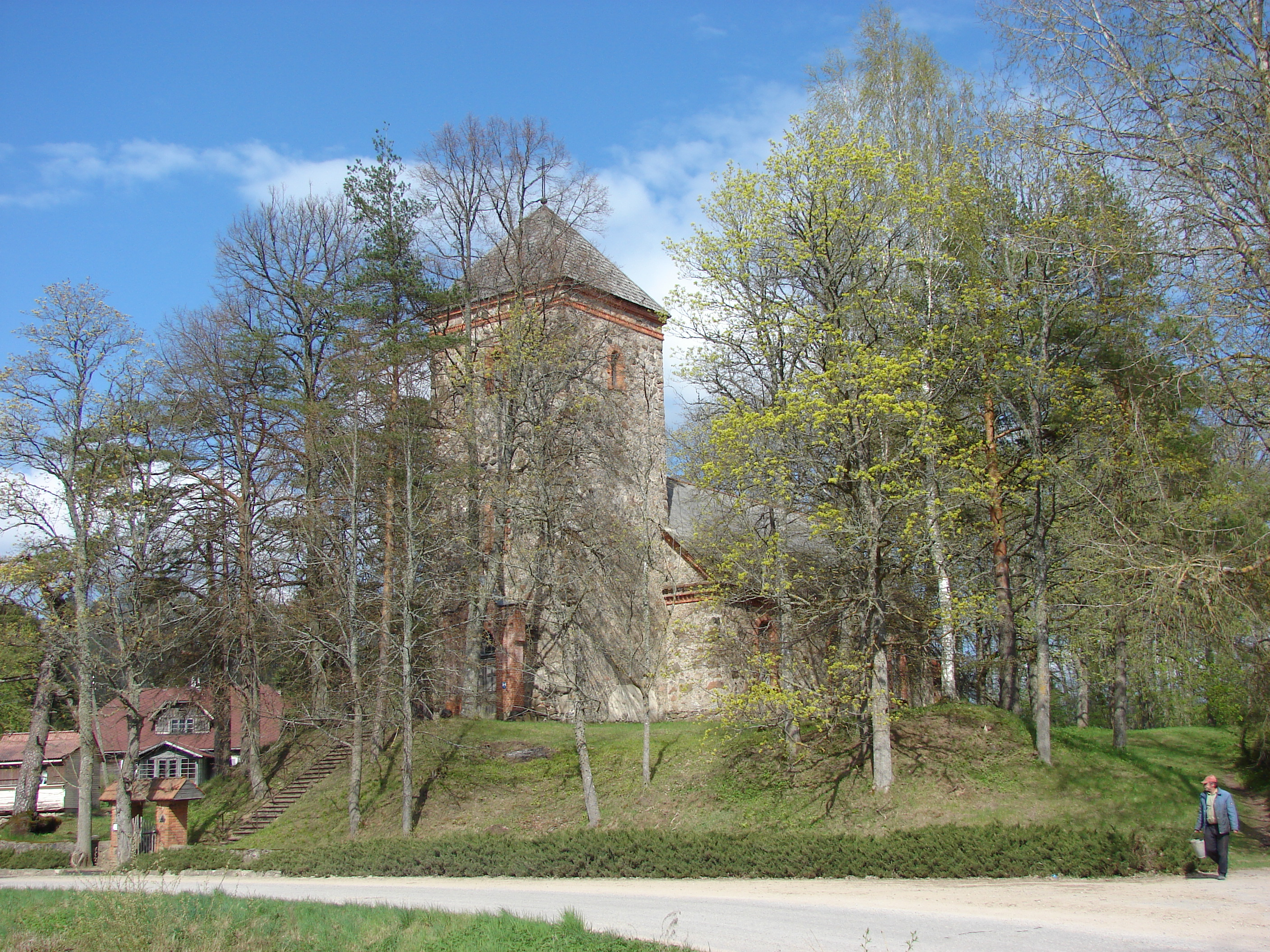 Dārtes evaņģēliski luteriskā baznīca (1895.), Vandzenes pagasts, Talsu novads, Latvia